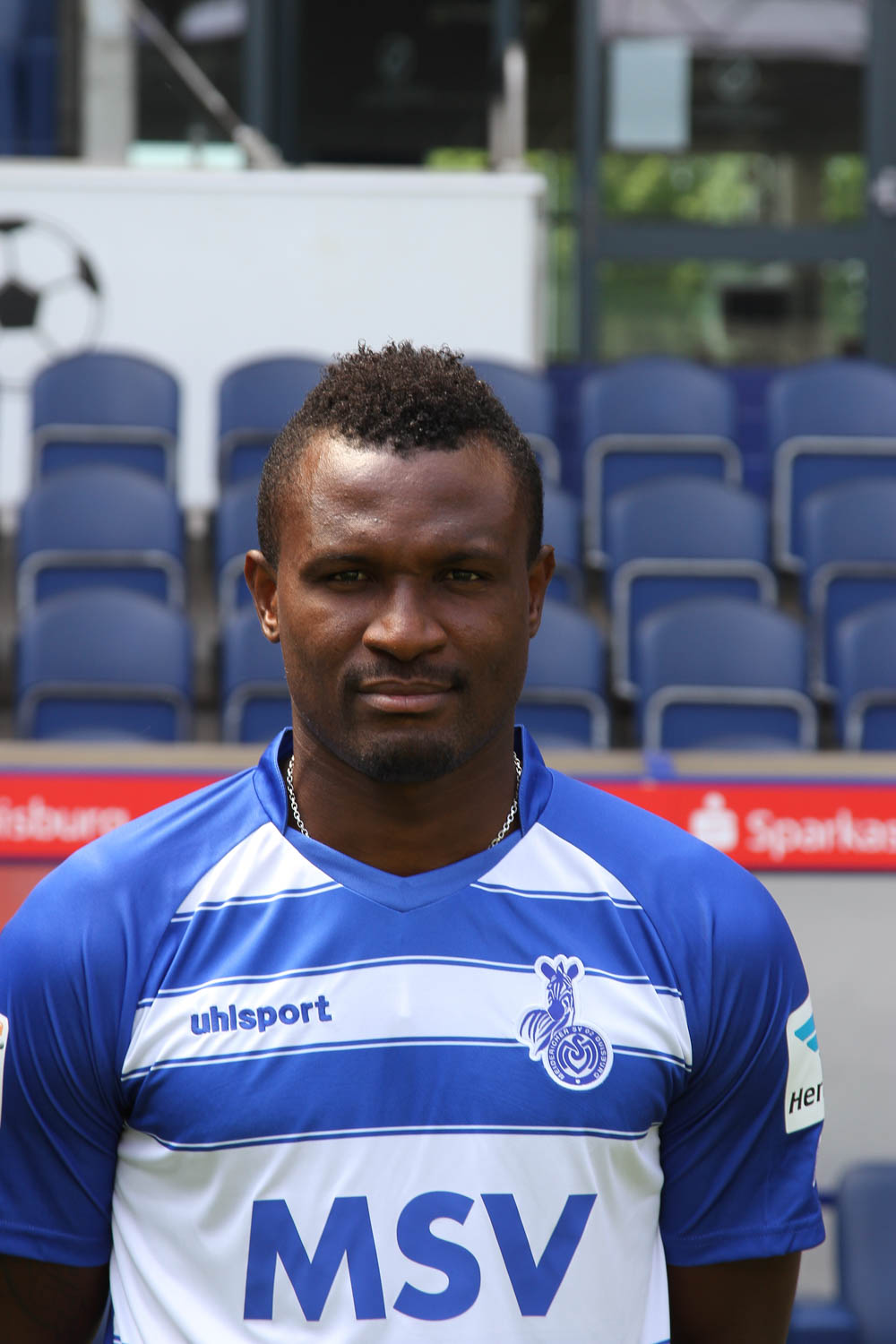 Kingsley Onuegbu 2015